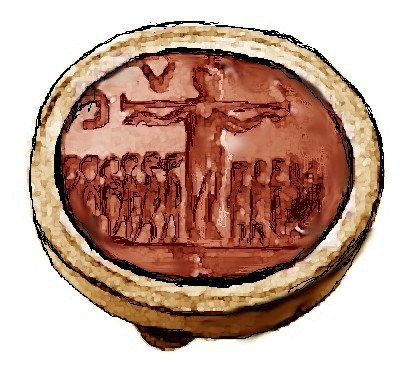 Cornalina con escena de la crucifixión de Cristo, del siglo III o IV d. C. Colección de Sir John Beazley.